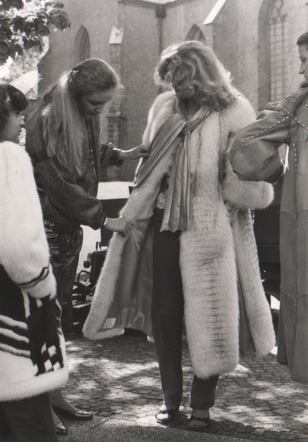 Pelzatelier Schöller, Gütersloh, Spiekergasse. Silverluchsgefärbter Blaufuchsmantel, Mix mit zweiter Fellart, mit metallic Nappaleder. Ausgezeichnet beim Modellwettbewerb des deutschen Kürschnerhandwerks.